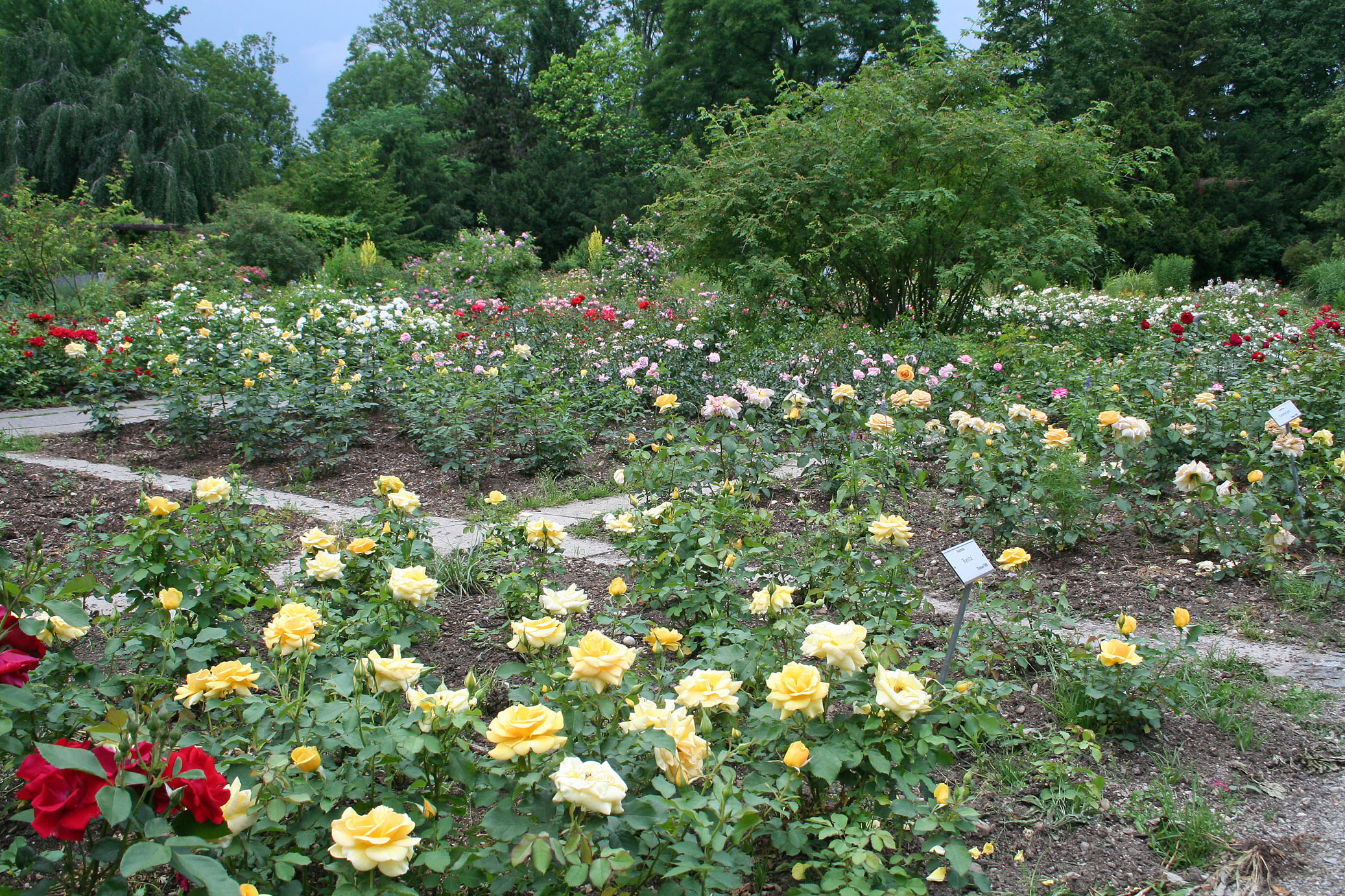 Rosenbeete im Rosengarten in München